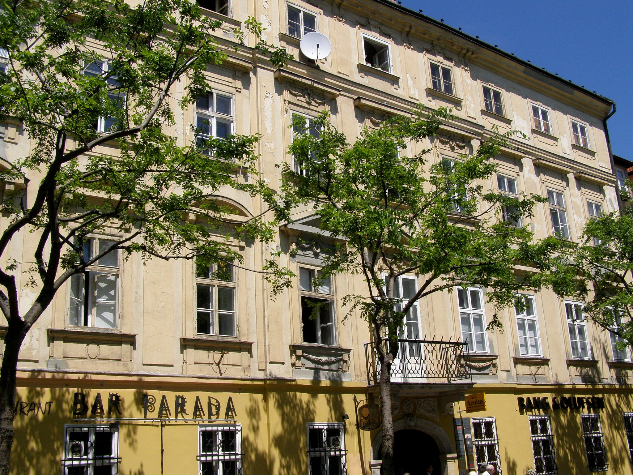 Hviezdoslavovo nám. č. 14